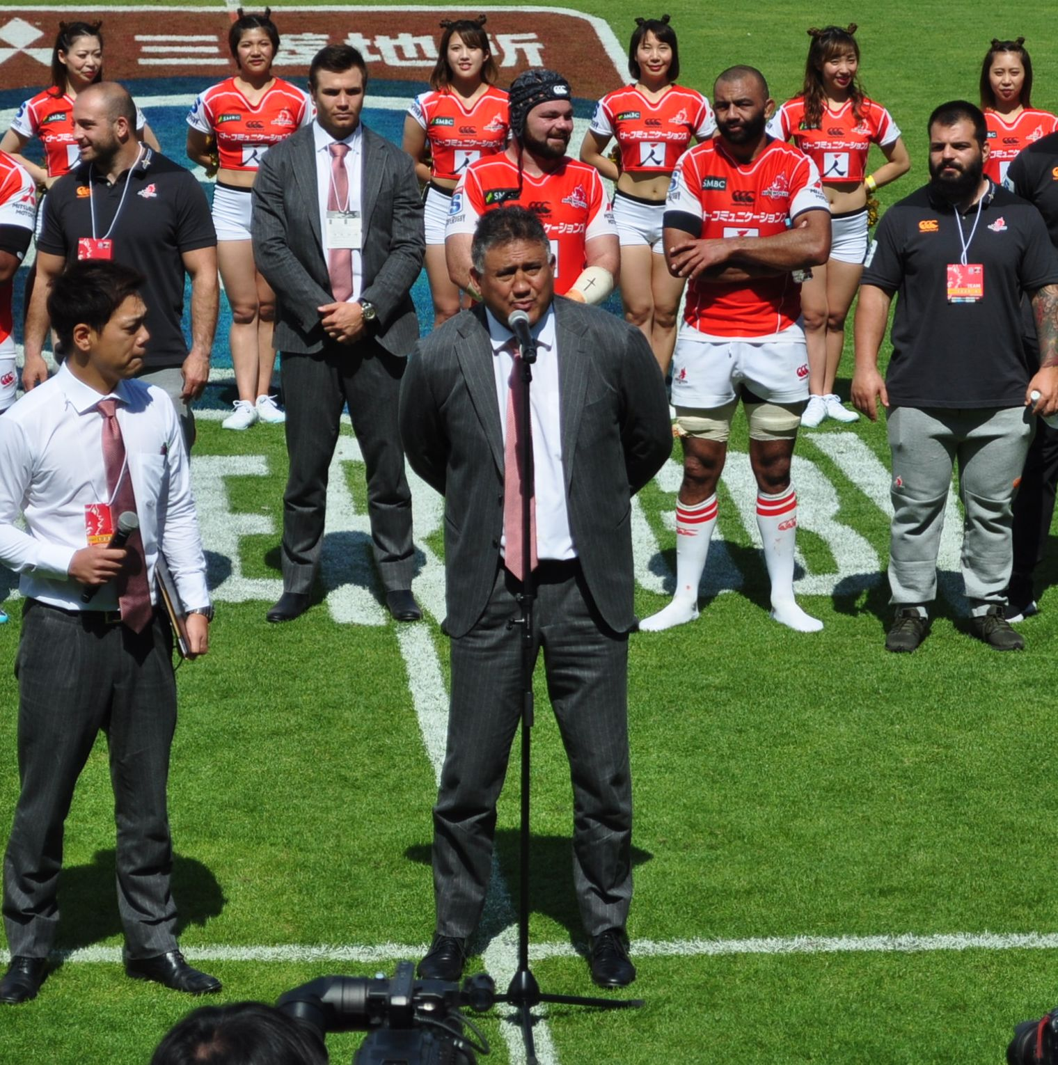 ジェイミー・ジョセフ